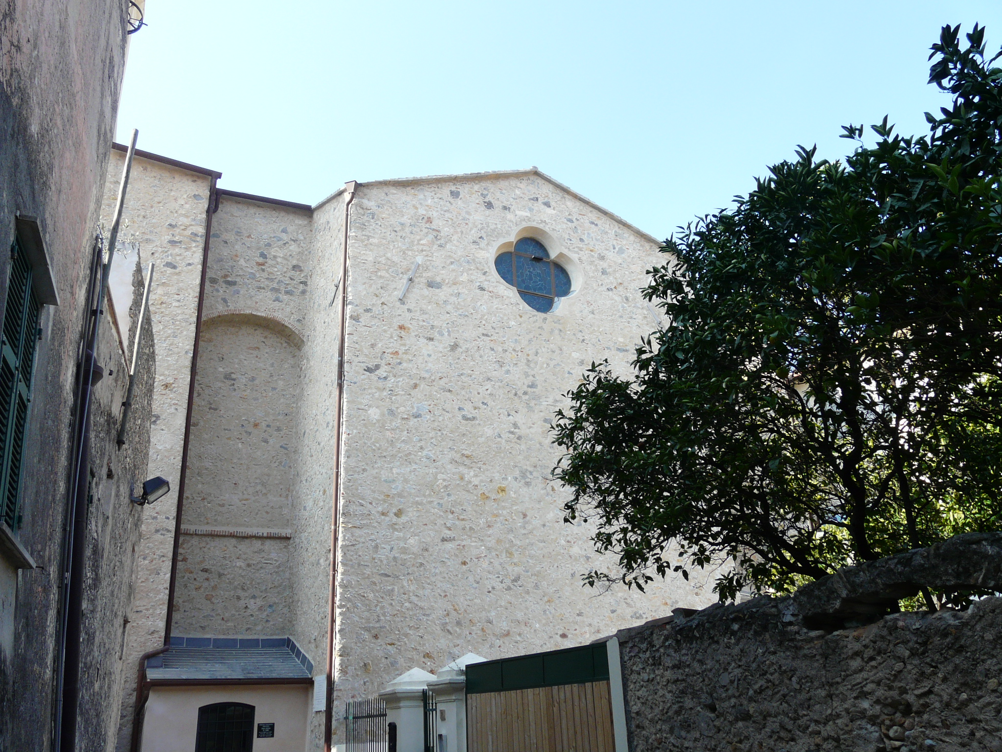 Chiesa di San Pietro, Borgio Verezzi, Liguria, Italia